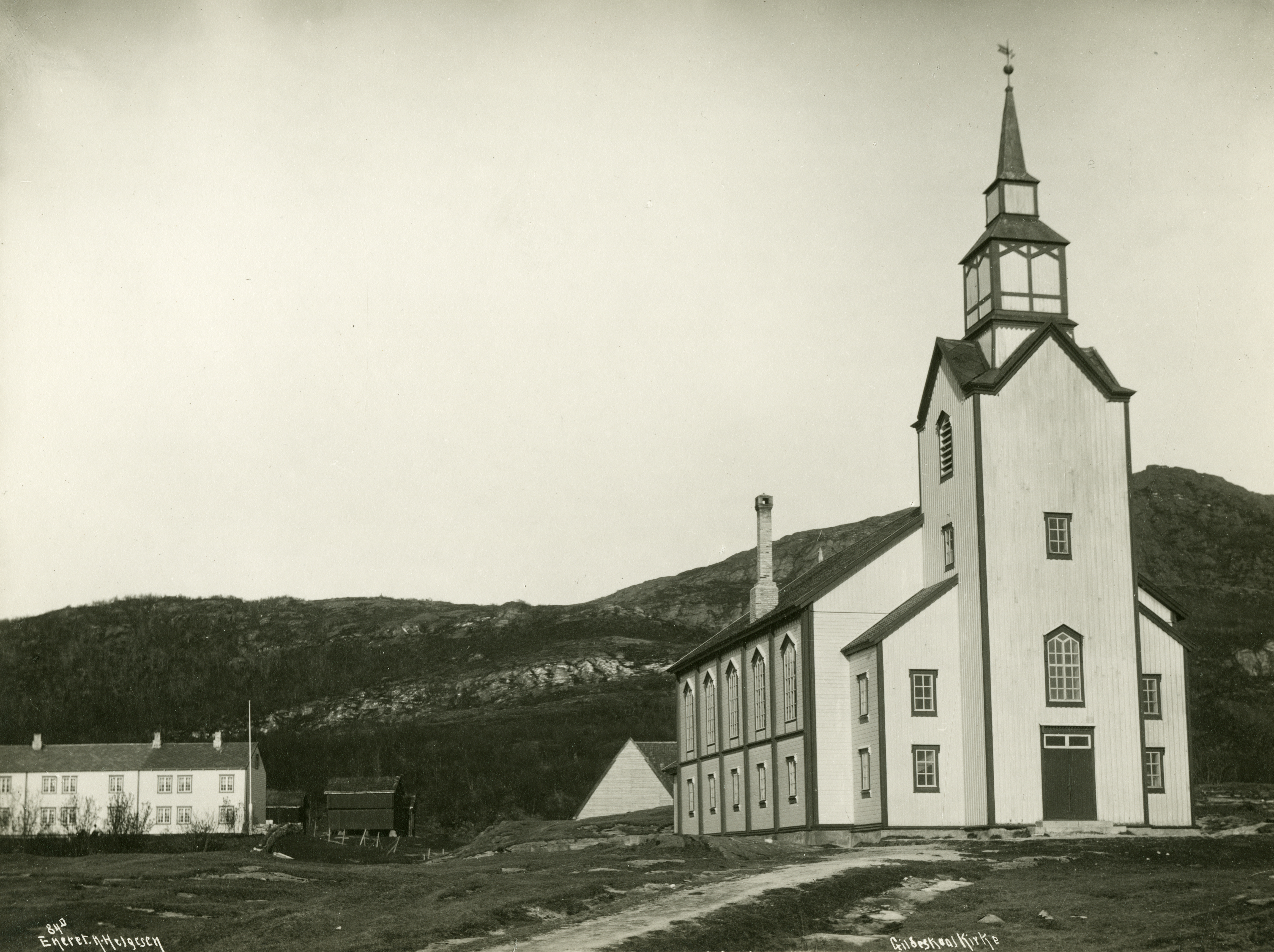 Gildeskål kirke i Gildeskål, Nordland This image on crowdsourcing geotagging platform Fotodugnad